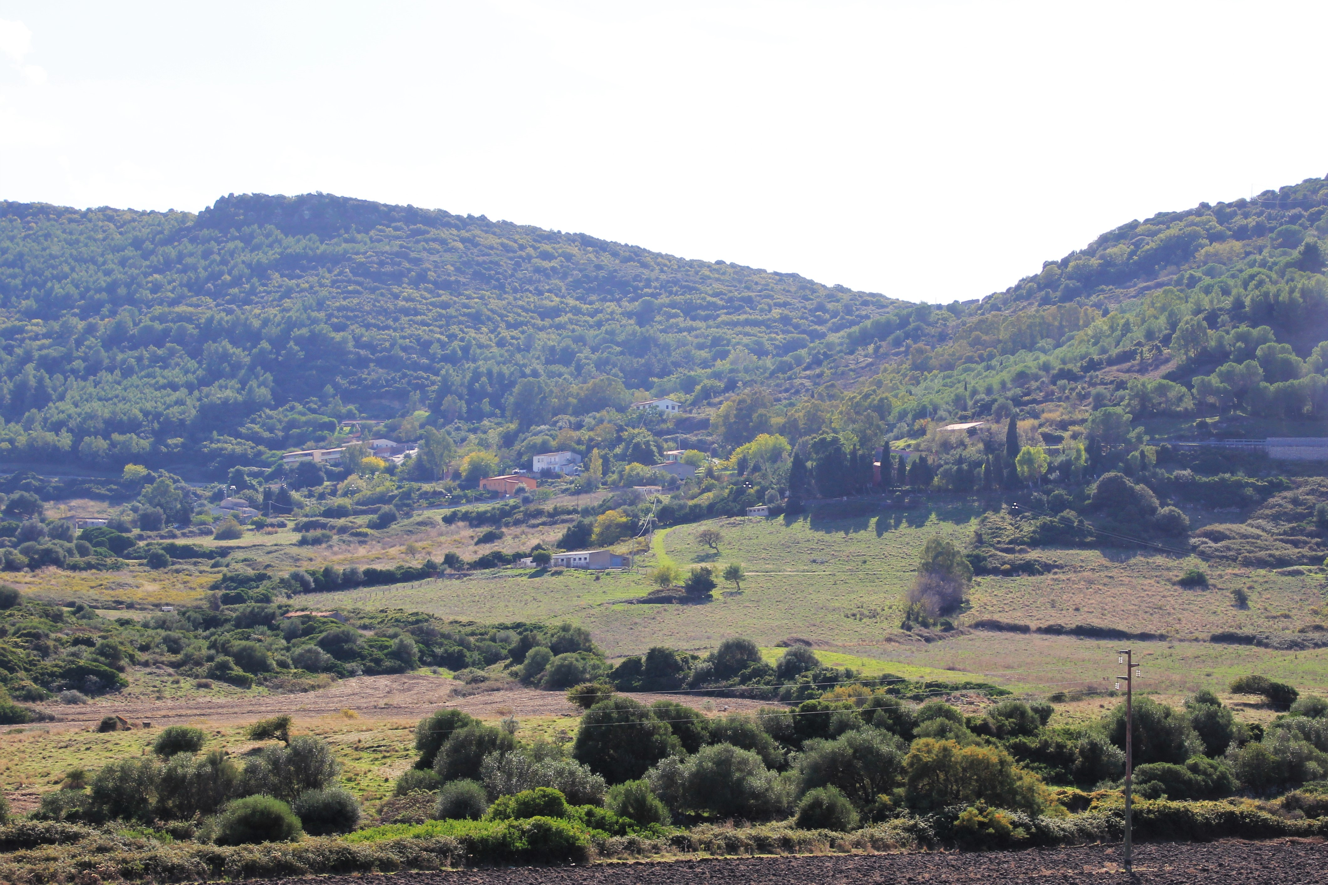 Castelsardo, frazione San Giovanni